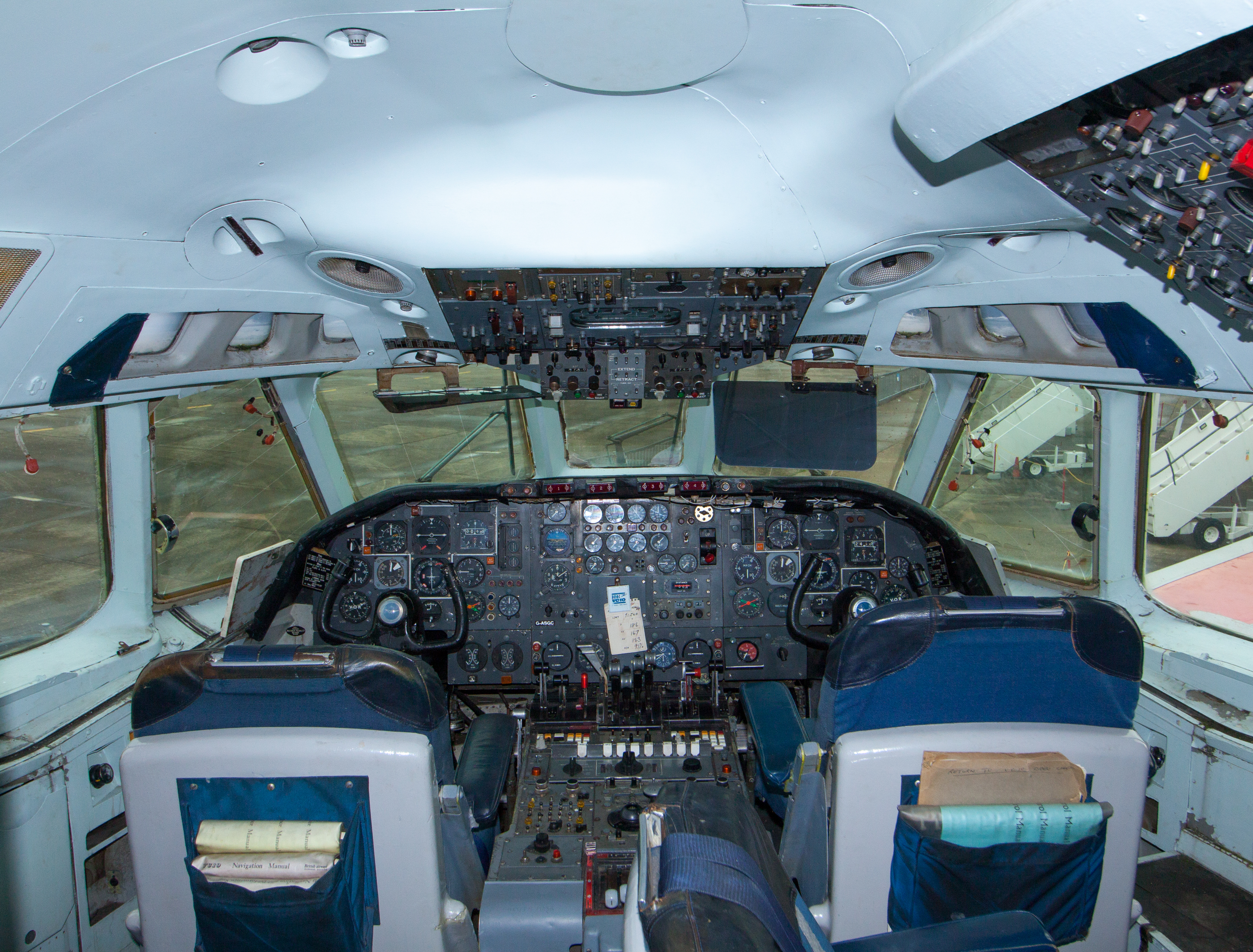 Cockpit einer Vickers VC-10